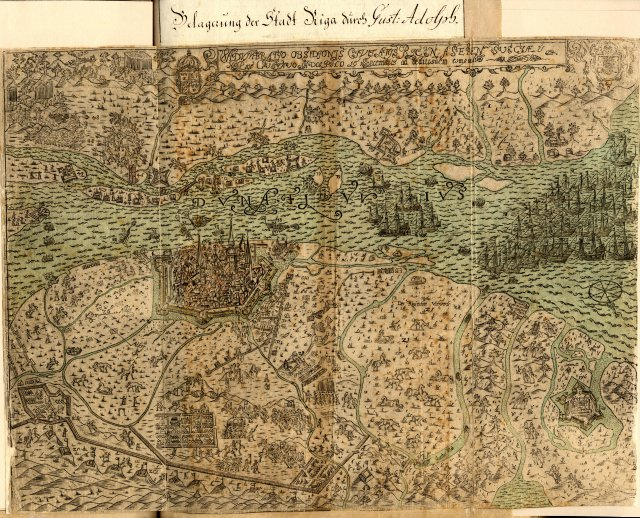 Scan from Johann Christoph Brotze's book Sammlung verschiedner Liefländischer Monumente. Belagerung der Stadt Riga durch Gust. Adolph [die Karte].